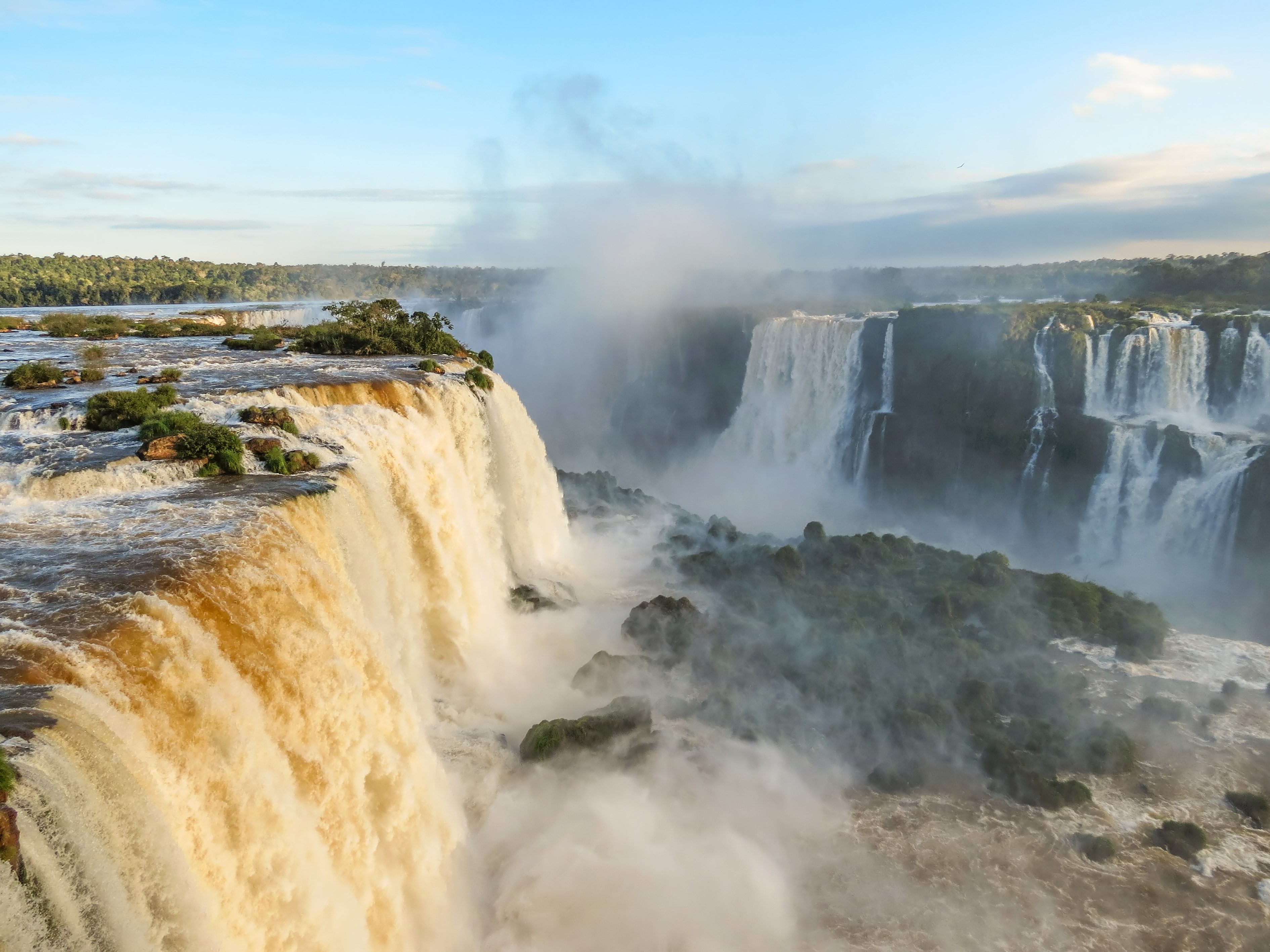 Cataratas do Iguaçu - vista da plataforma de observação.